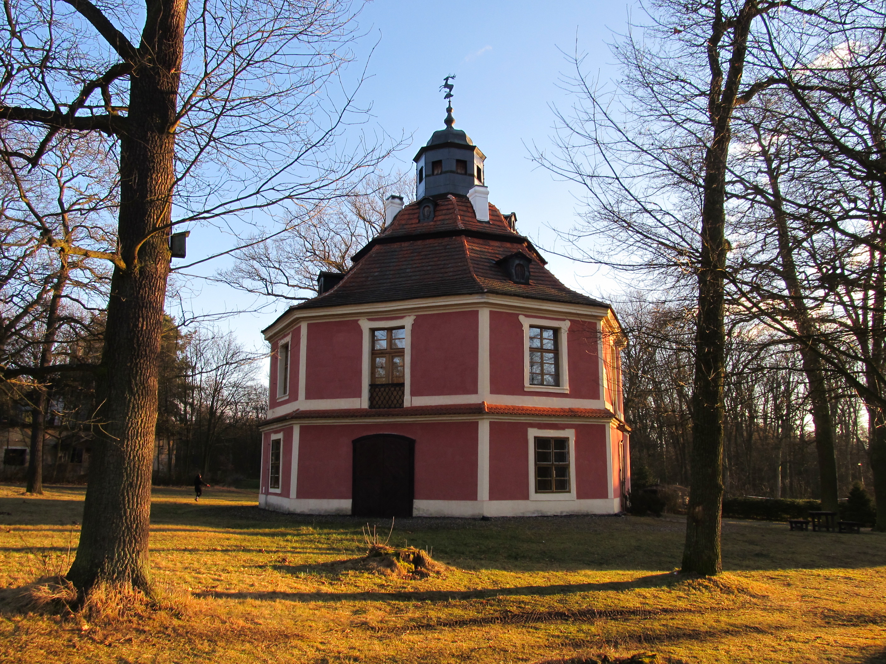 Svatý Hubert - lovecký zámeček